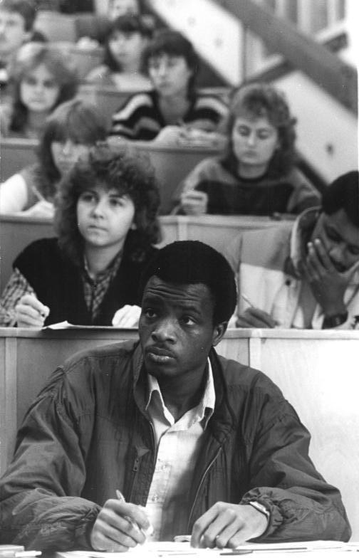 Chemnitz, Gaststudent der TU ADN-ZB Thieme 12.11.86 Karl-Marx-Stadt: Die Technische Hochschule Karl-Marx-Stadt erhält am 14.11.1986 den Status "Technische Universität". In den vergangenen Jahren profilierte sich die Bildungseinrichtung besonders auf den Gebieten der bedienarmen Produktion einschließlich durchgängiger CAD-CAM-Lösungen im Maschinenbau, der Elektrotechnik-Elektronik und der Leichtindustrie. Ebenso stehen die Anwendung der Mikroelektronik und der Einsatz von Industrierobotern im Mittelpunkt der Forschungsaufgaben. Zu den ausländischen Studenten aus 34 Ländern, die an der TH Karl-Marx-Stadt studieren, gehört auch Hoises Jose da Costa aus Angola. -siehe auch 1986-1112-1, 3 und 4N